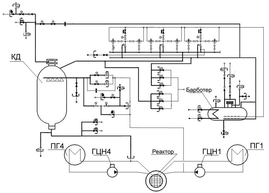 Технологическая схема системы компенсации давления